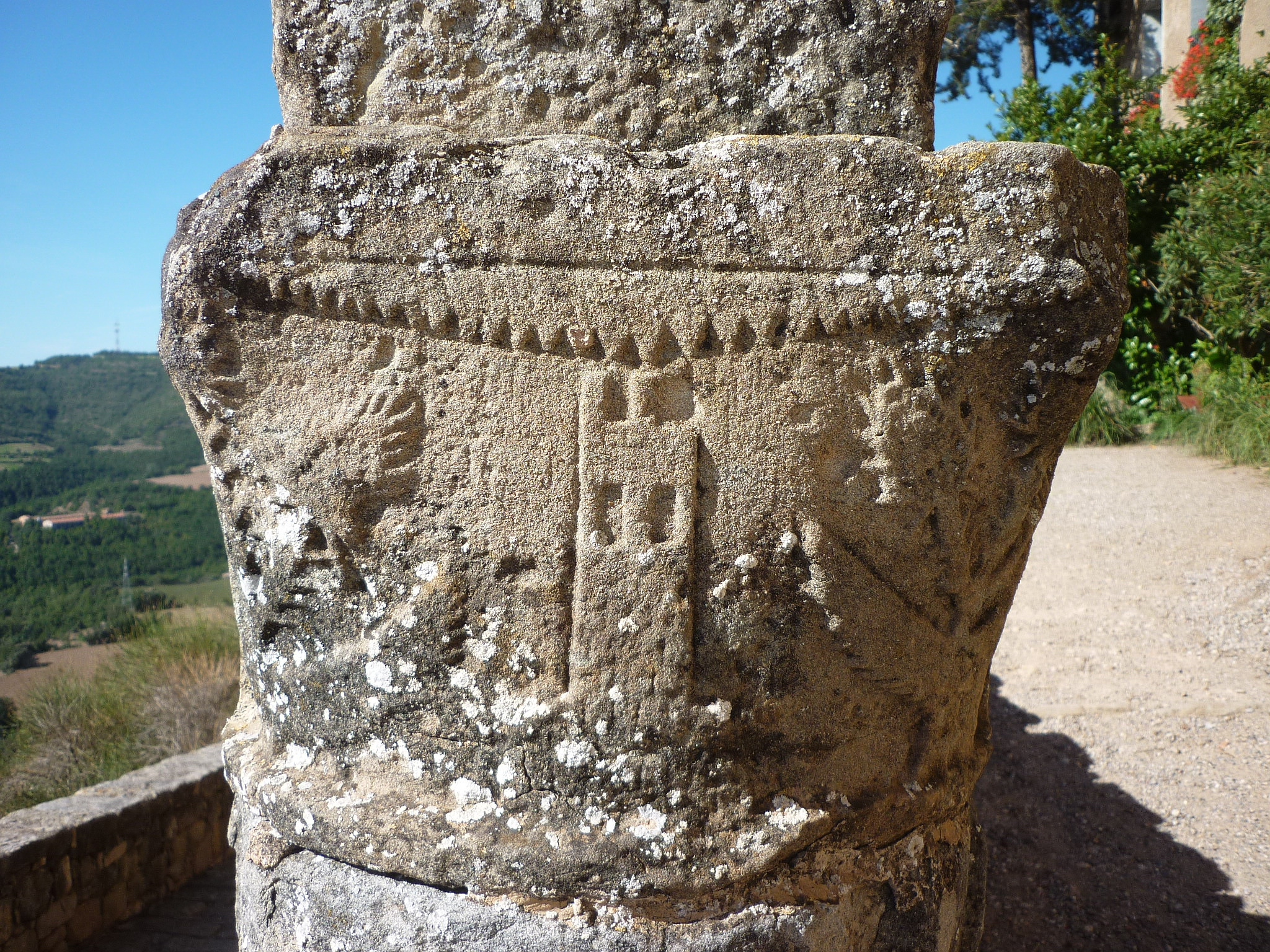 Castellvell de Solsona (Olius)